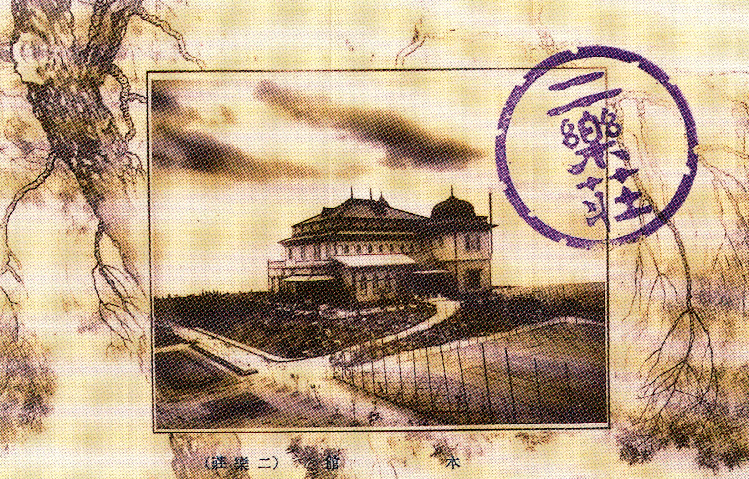 絵はがきに描かれた二楽荘本館。